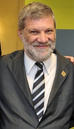 Roberto Kreimerman, Ministro de Industria de Uruguay.